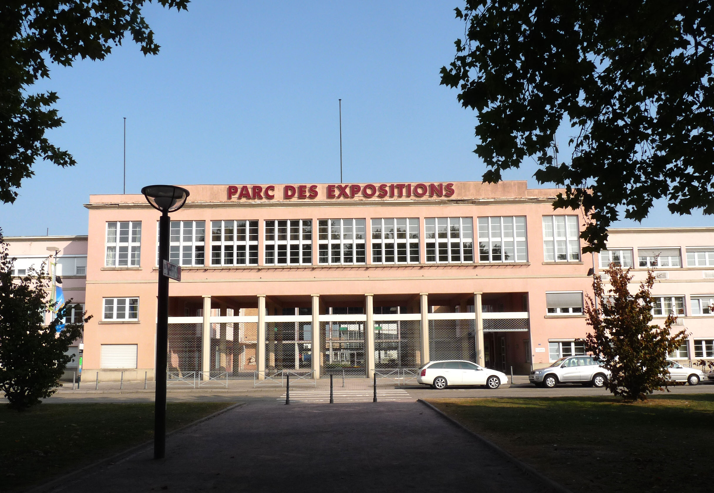 Parc des Expositions (Strasbourg, Wacken)